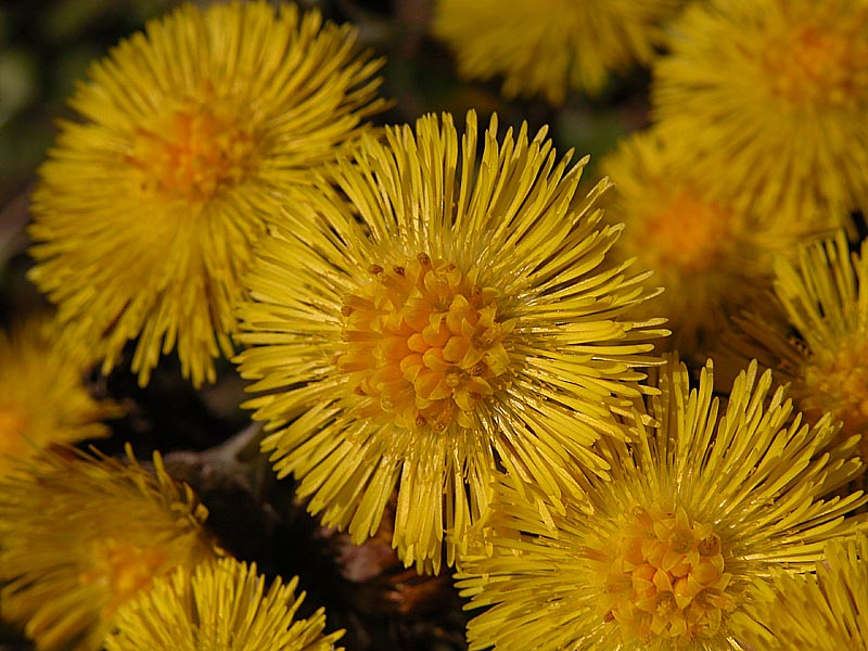 Huflattich (Tussilago farfara) am Schlossteich in Großen-Buseck